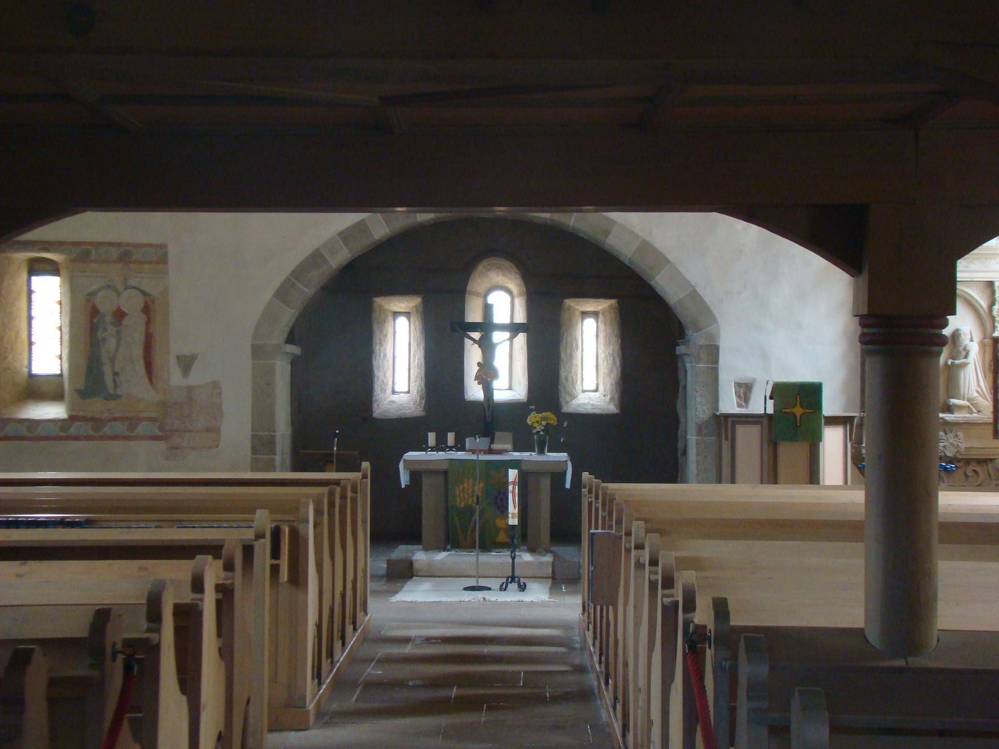 Inneres der Kilianskirche in Talheim (Landkreis Heilbronn)